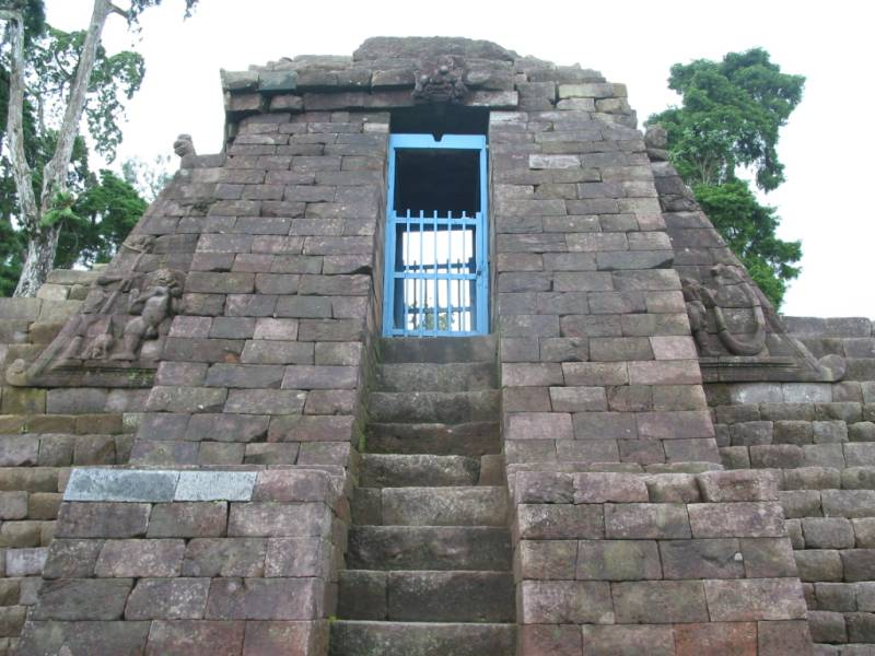 Candi Sukuh